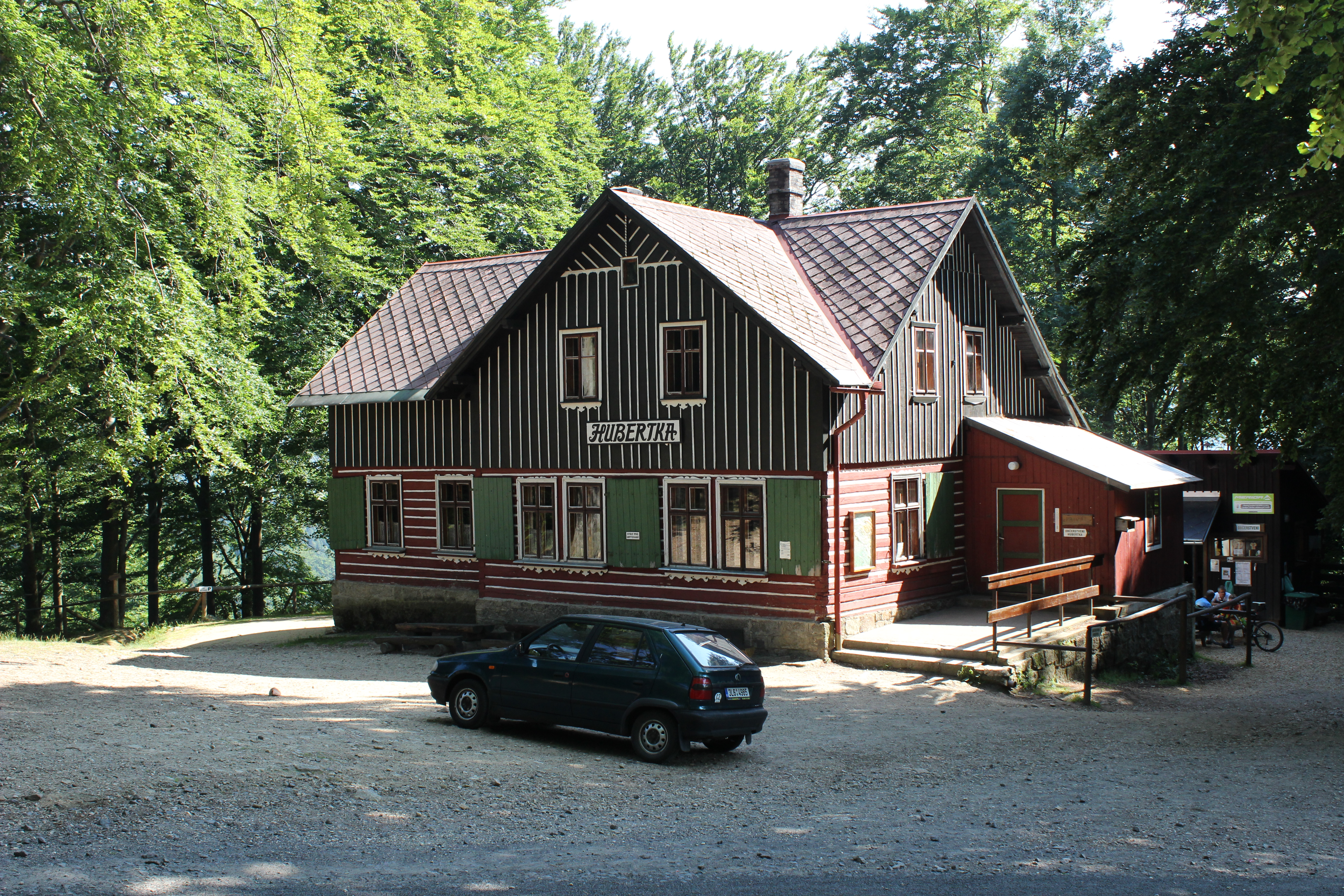 Turistická chata Hubertka nad Lázněmi Libverdou.